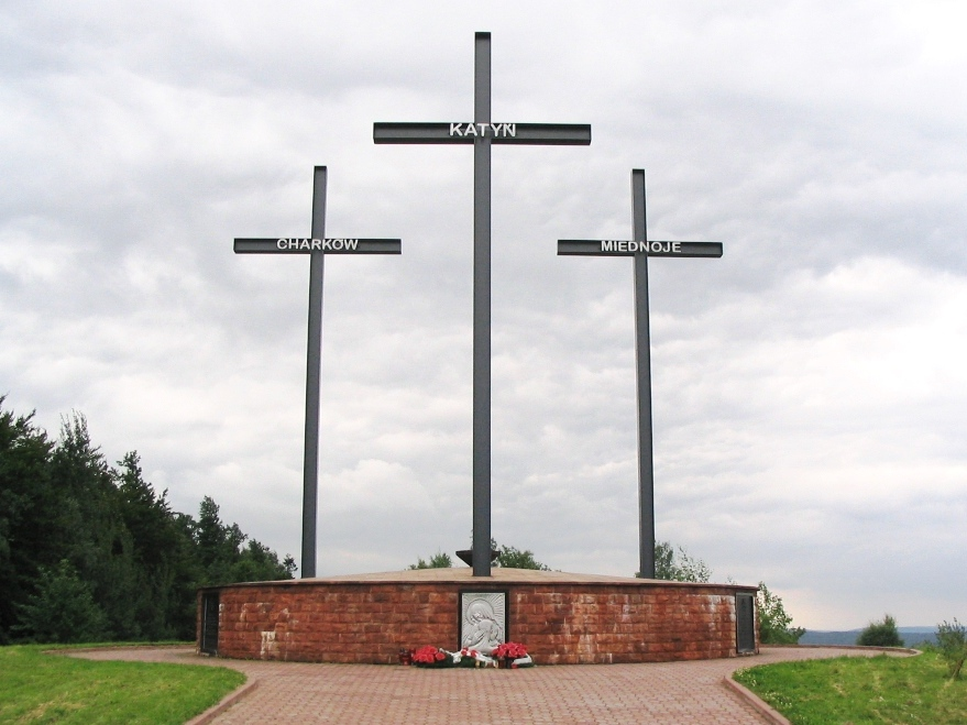 Trzy Krzyże u podnóża Świętego Krzyża.